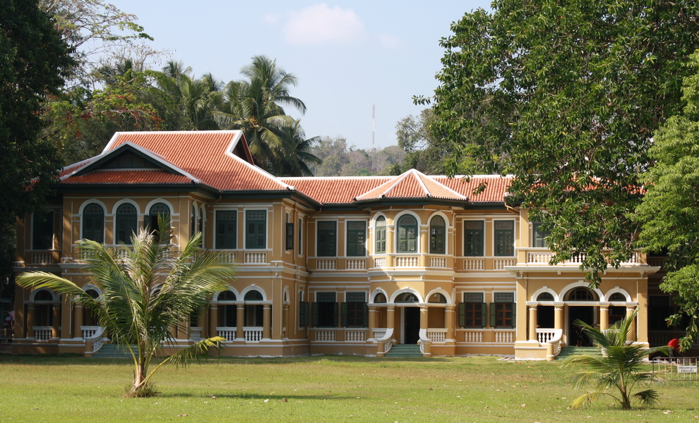 Особняк семьи Чинпрача в Пхукет-тауне, Тиаланд